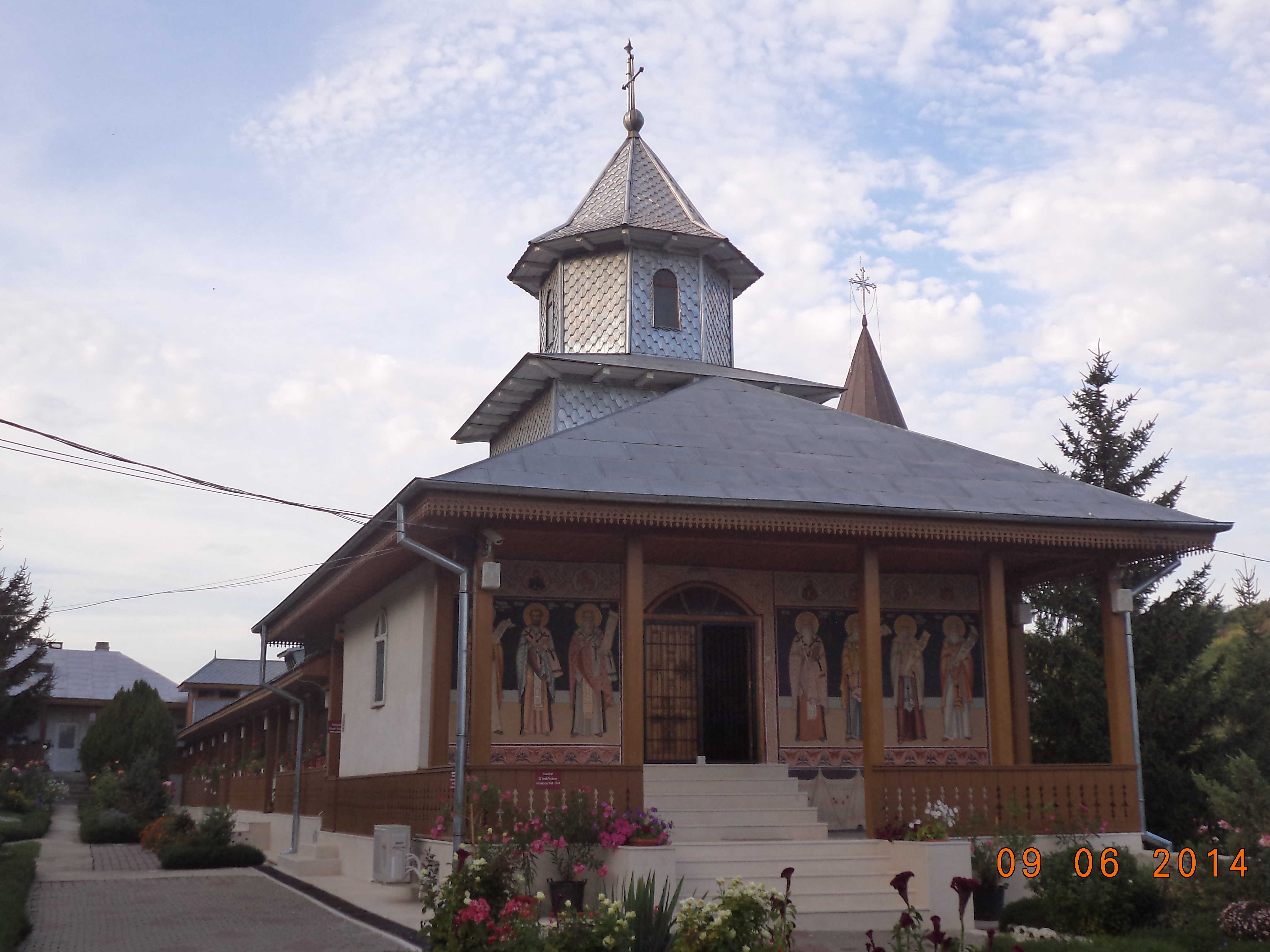 Paraclisul schitului Brazi